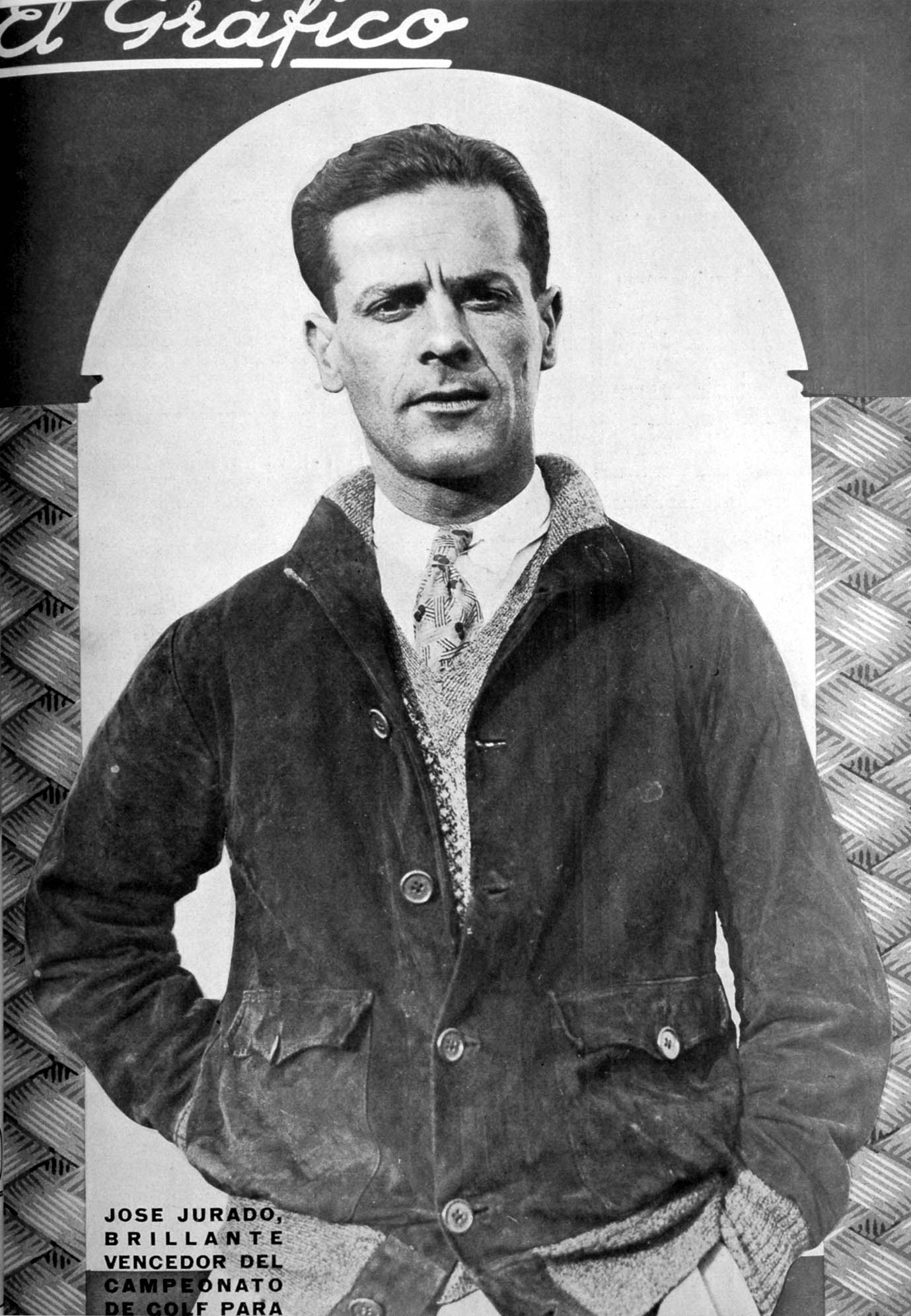 El Grafico del 03 de Septiembre de 1927. Edicion 426